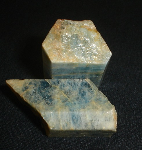 Beryl, aquamarine variety